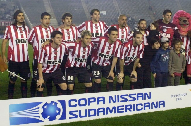 Estudiantes de La Plata 2008: 3ro. en el Torneo Clausura y finalista de la Copa Sudamericana. Arriba: Marcos Angeleri, Diego Galván, Juan Manuel Díaz, Agustín Alayes, Juan Sebastián Verón, Christian Cellay y Mariano Andújar; abajo: Matías Sánchez, Gastón Fernández, Leandro Benítez y Mauro Boselli.